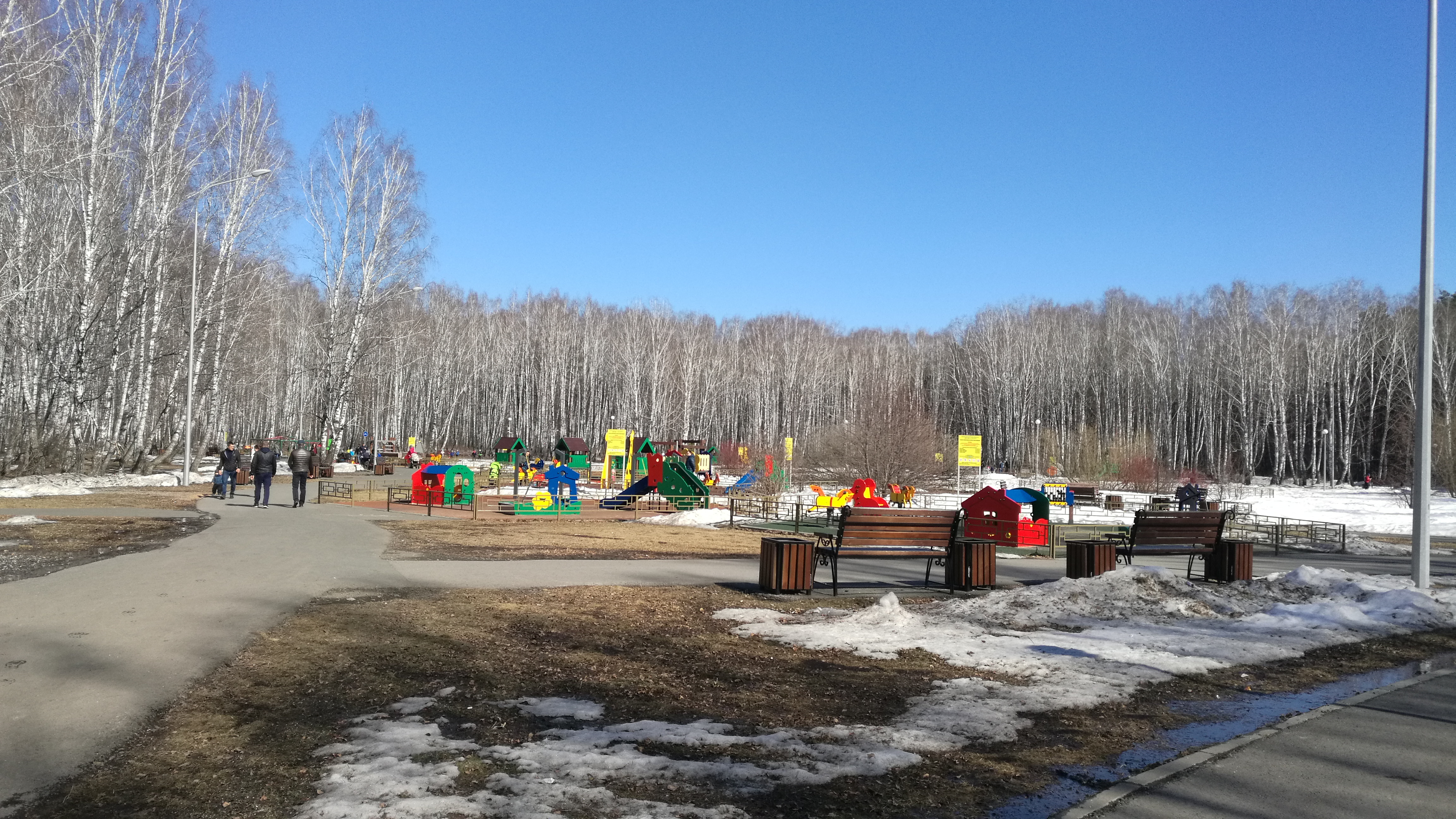 Gilova bosko. Tjumeno, Rusio.